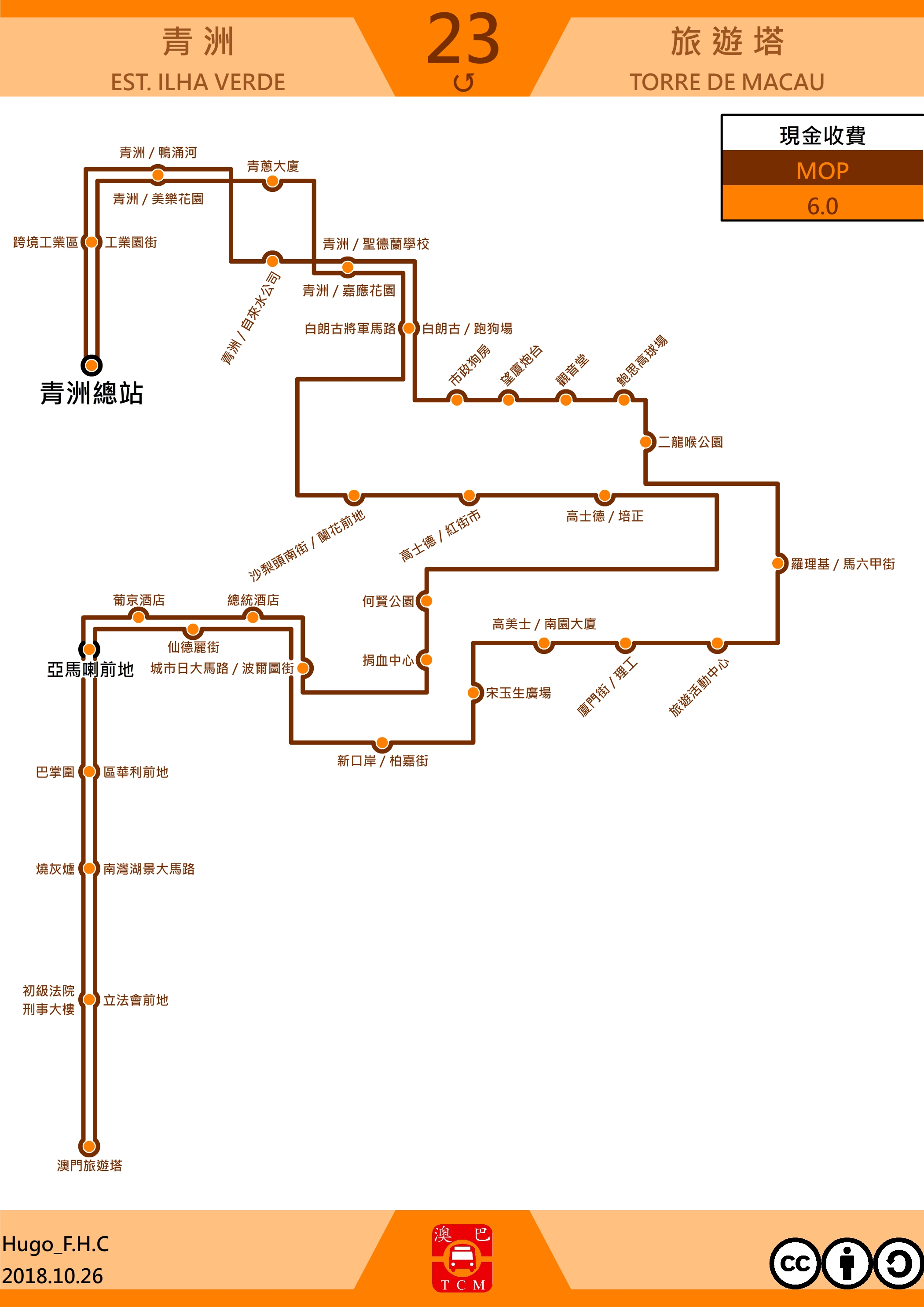 澳門巴士23走線圖